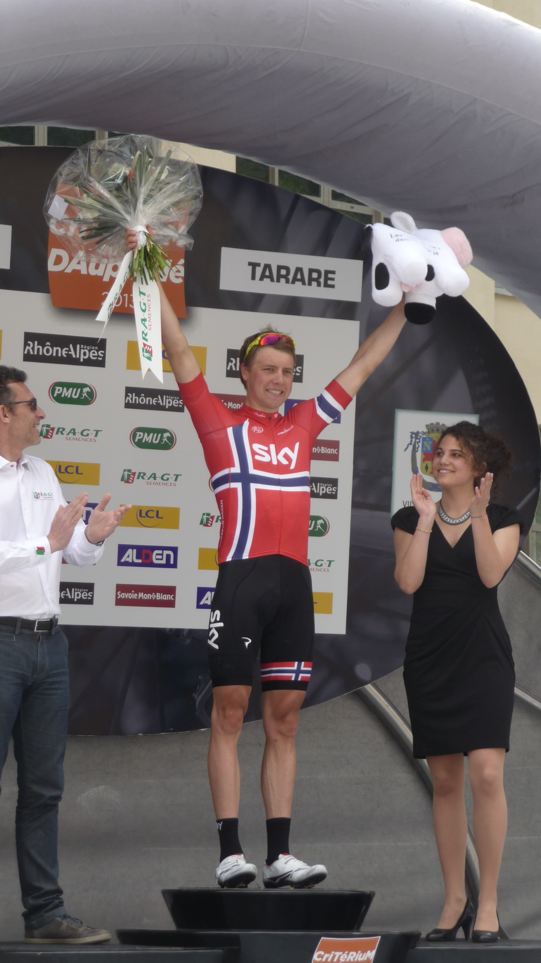 Arrivée de la 3e étape du Critérium du Dauphiné 2013 à Tarare le mardi 4 juin 2013. Podium de la 3e étape à Tarare, Edvald Boasson Hagen vainqueur de l'étape